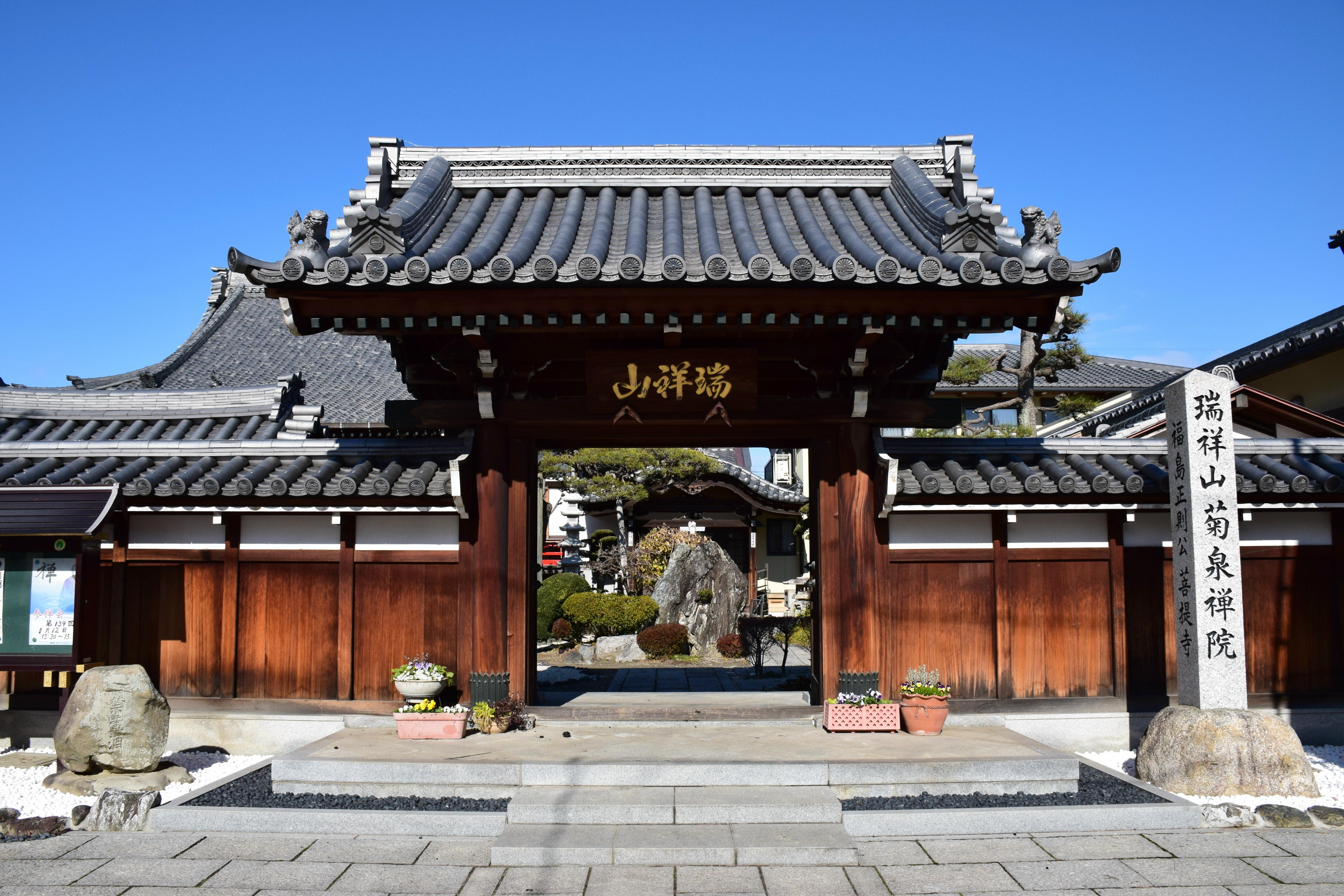 菊泉院山門